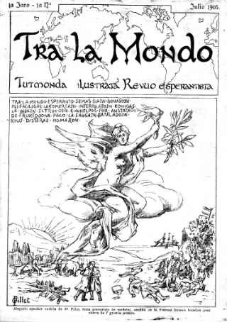 Kovrilo de la unua numero de la revuo "Tra La Mondo" (Julio 1905)